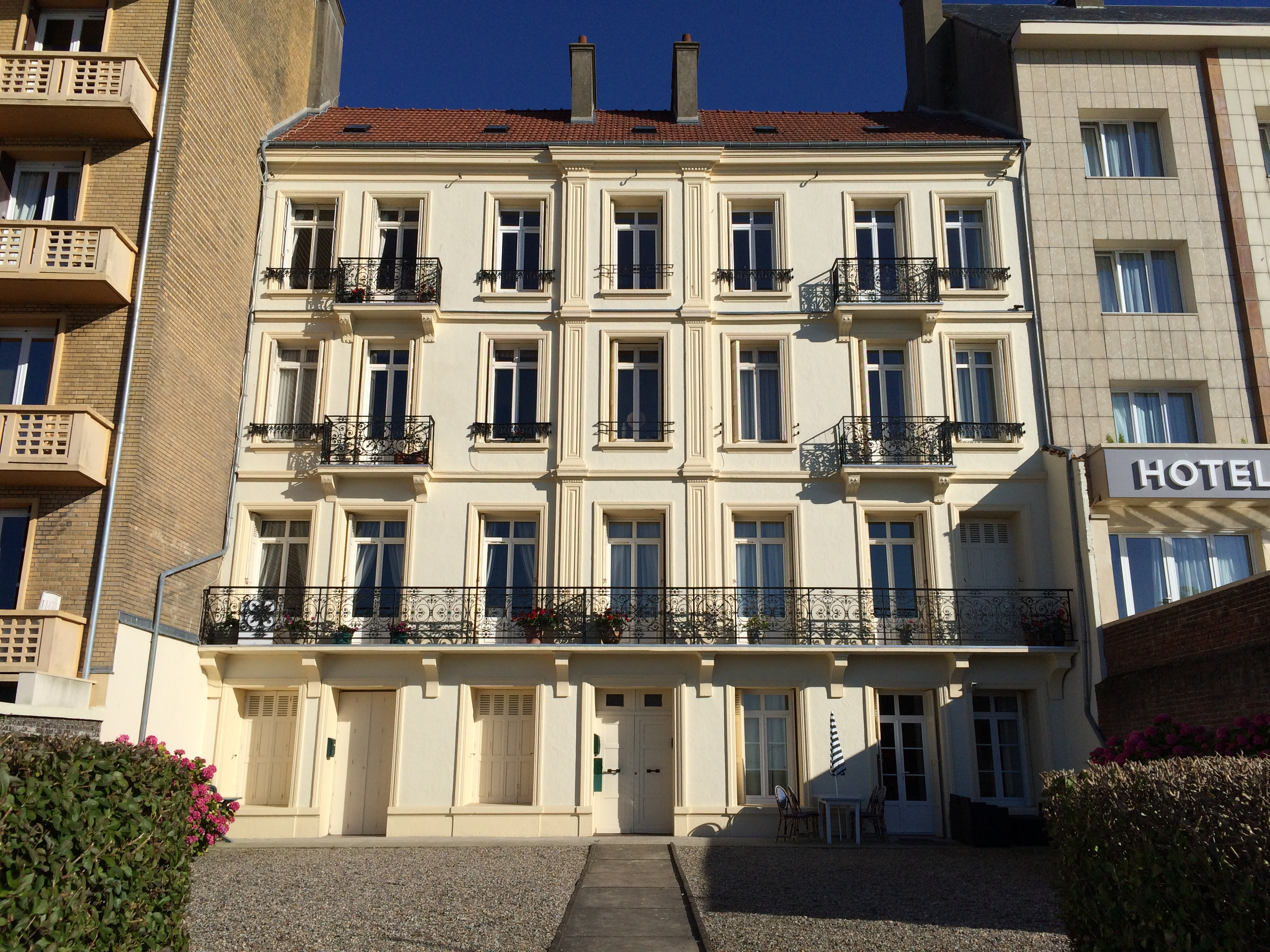 Villa de Dame Crevier construite vers 1842-1845 bd de verdun, Dieppe